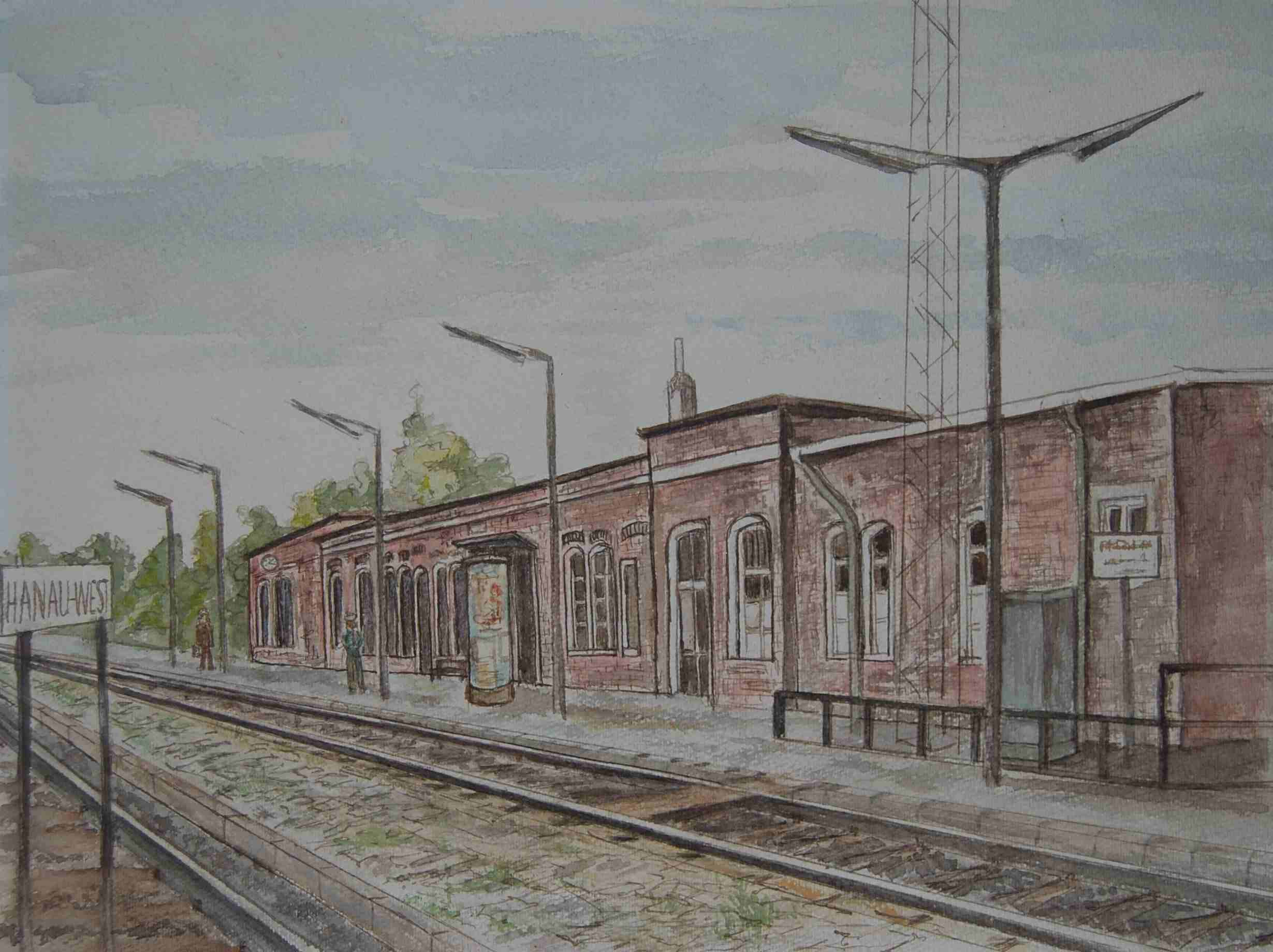 Zeichnung des Bahnhofsgebäudes von Irmgard Collmann aus dem Jahr 1975. Das Gebäude steht auf der Stadt zugewandten Seite der Gleise. Rechtes Gleis: Fahrtrichtung Frankfurt.